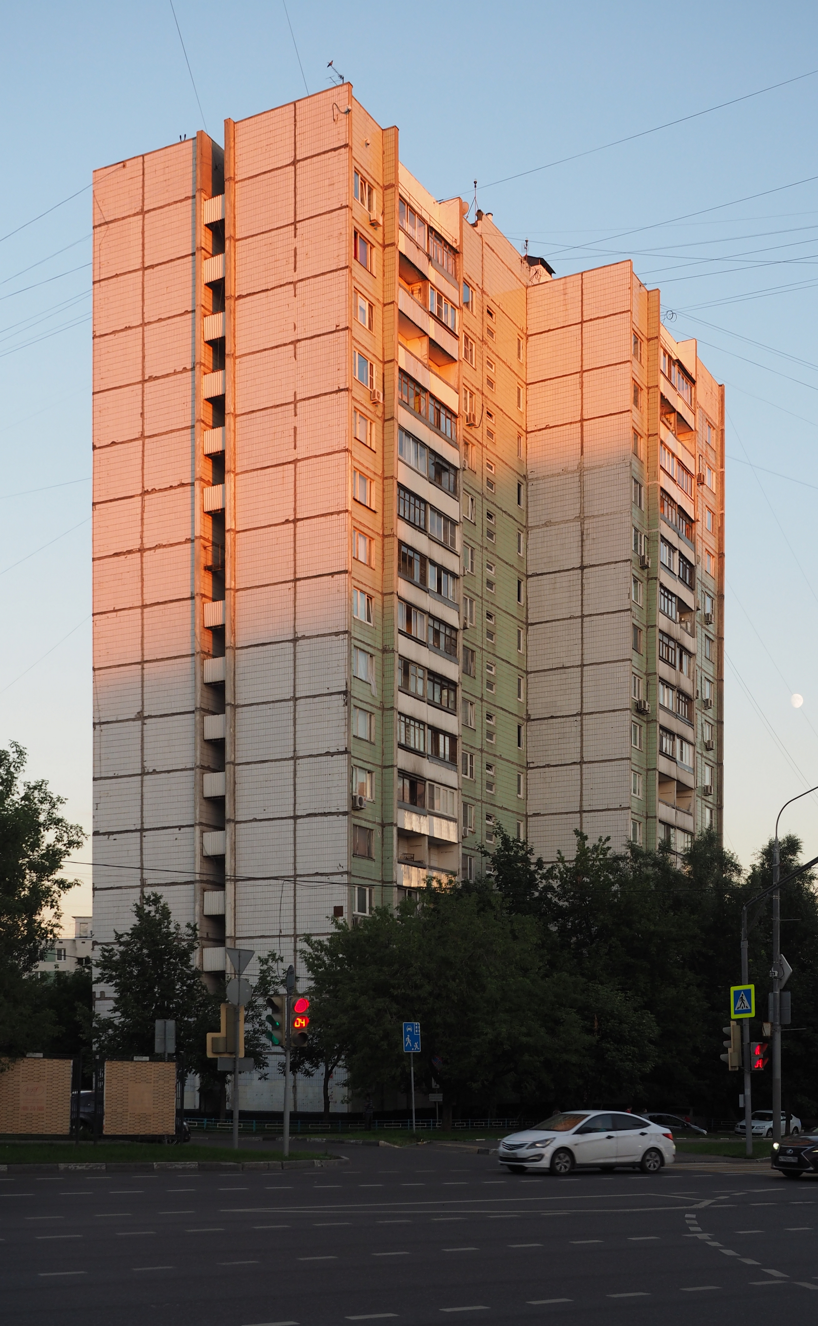 OLYMPUS DIGITAL CAMERA Moscow #Kotlovka_District Sevastopol'skij prospekt 15 k1 Москва #район_Котловка Севастопольский проспект 15 к1